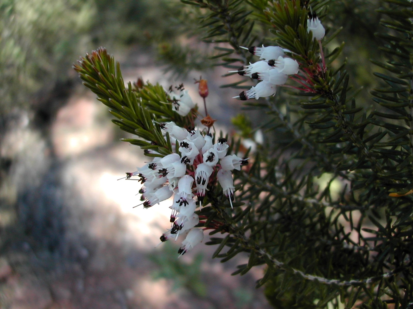 Erica multiflora